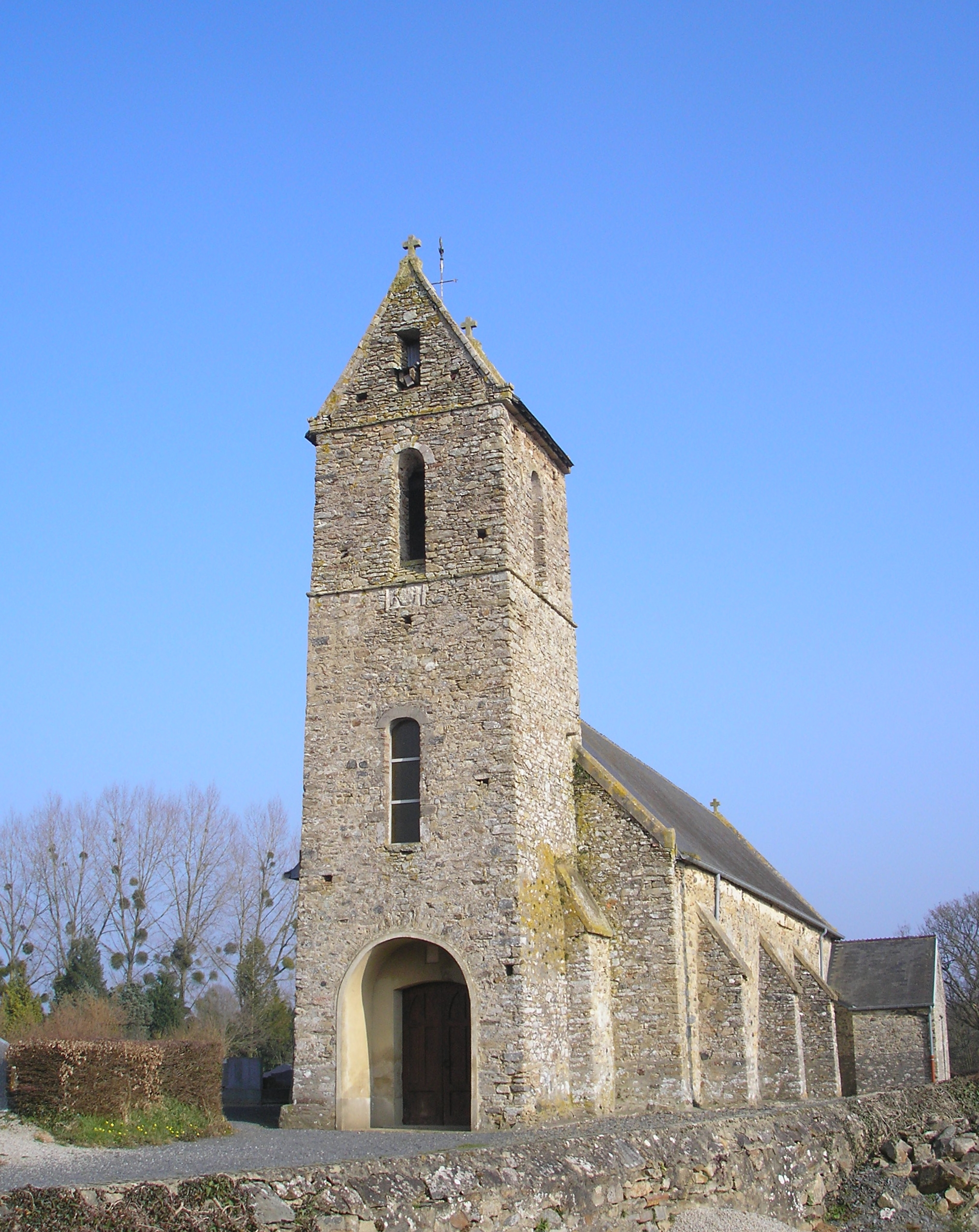 Le Mesnil-Eury (Normandie, France). L'église Saint-Pierre.